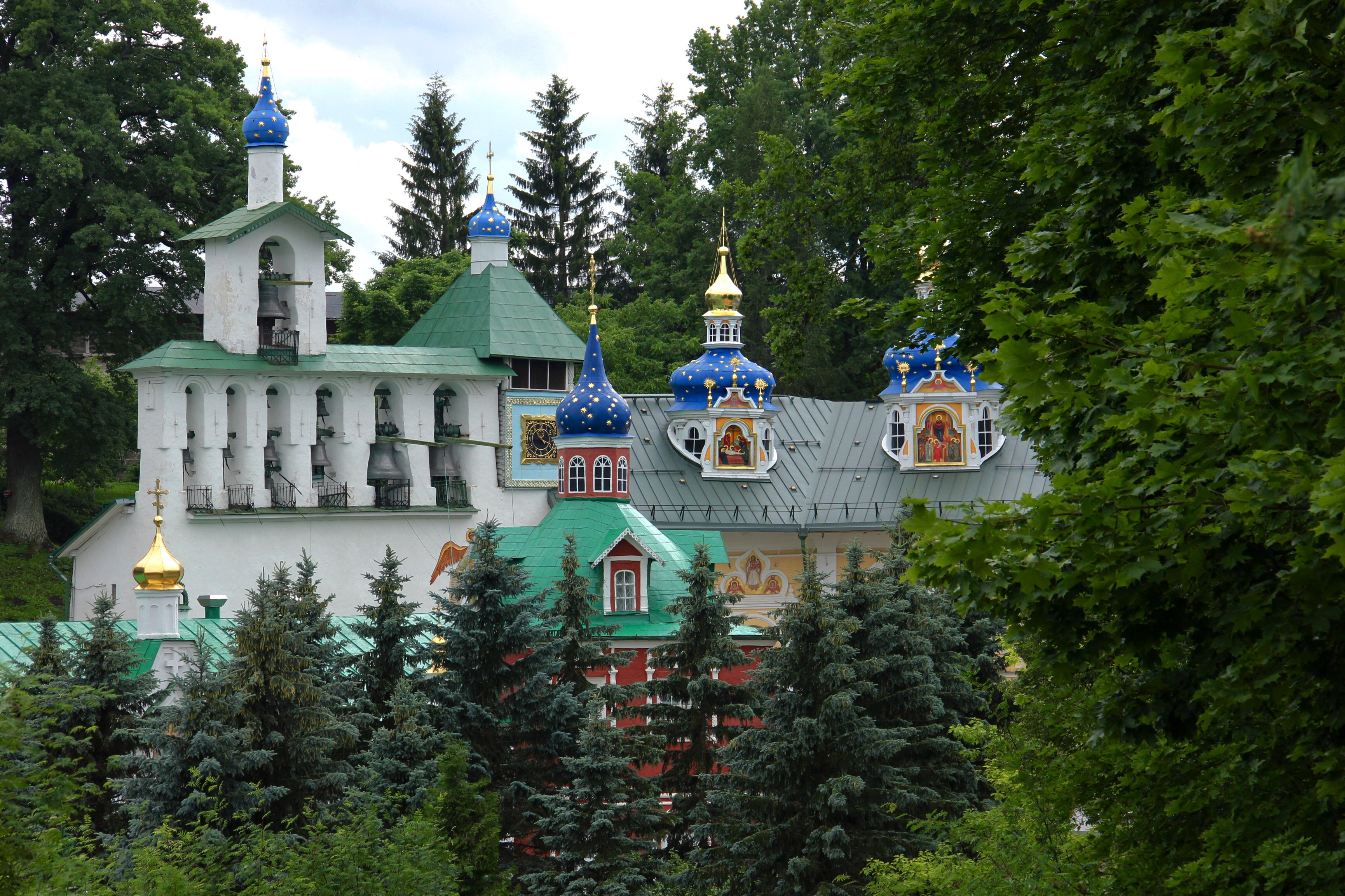 Ансамбль Псково-Печерского монастыря (Псковская область, Печоры, (на юго-восточной окраине города Печоры))